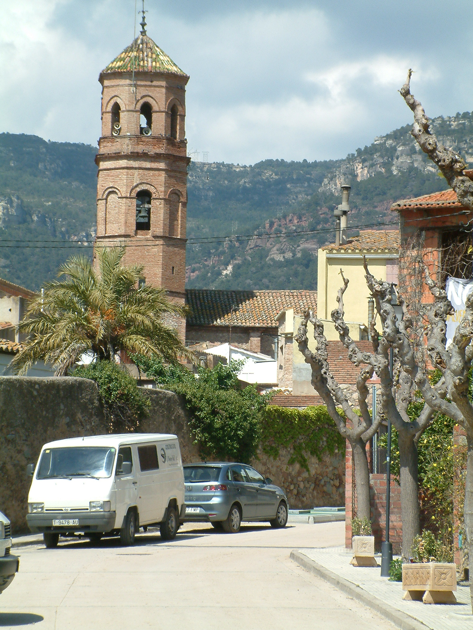 És una vista del campanar de l'esglèsia de la Nativitat de la Mare de Déu de Vilaplana des del carrer nou.